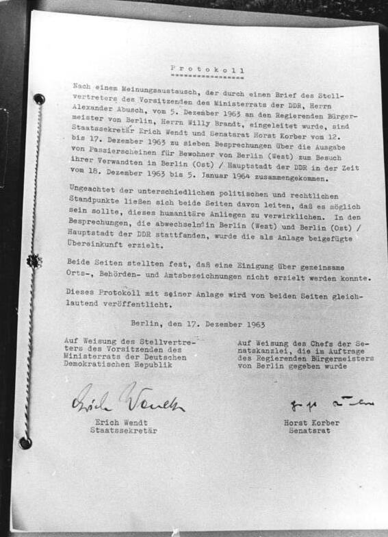 Zentralbild-Repro Ga-Qu 17.12.1963 Protokoll über Passierscheine unterzeichnet Das Protokoll über Passierscheine ( unser Bild ) für die Westberliner zum Besuch ihrer Verwandten in der Hauptstadt der DDR während der kommenden Feiertage ist am 17.12.1963 von Staatssekretär Wendt und Senatsrat Korber unterzeichnet worden.